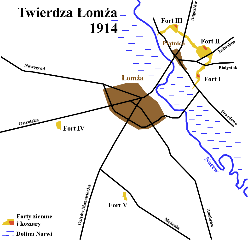 Szkic rozmieszczenia fortów twierdzy Łomża